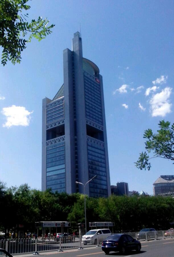 中文（中国大陆）: 北京电视台